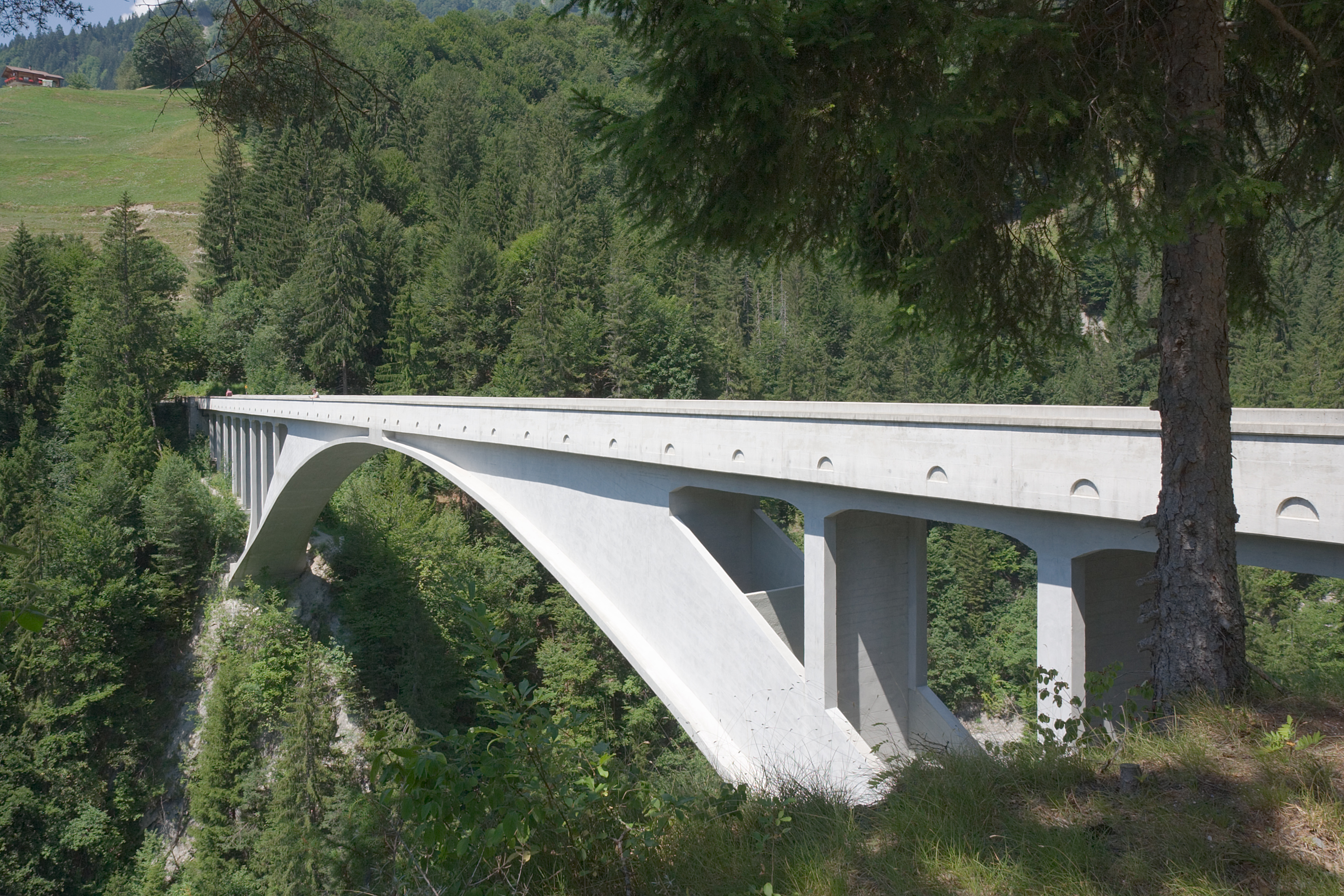 Die Salginatobelbrücke bei Schiers, SchweizAnsicht von Südosten